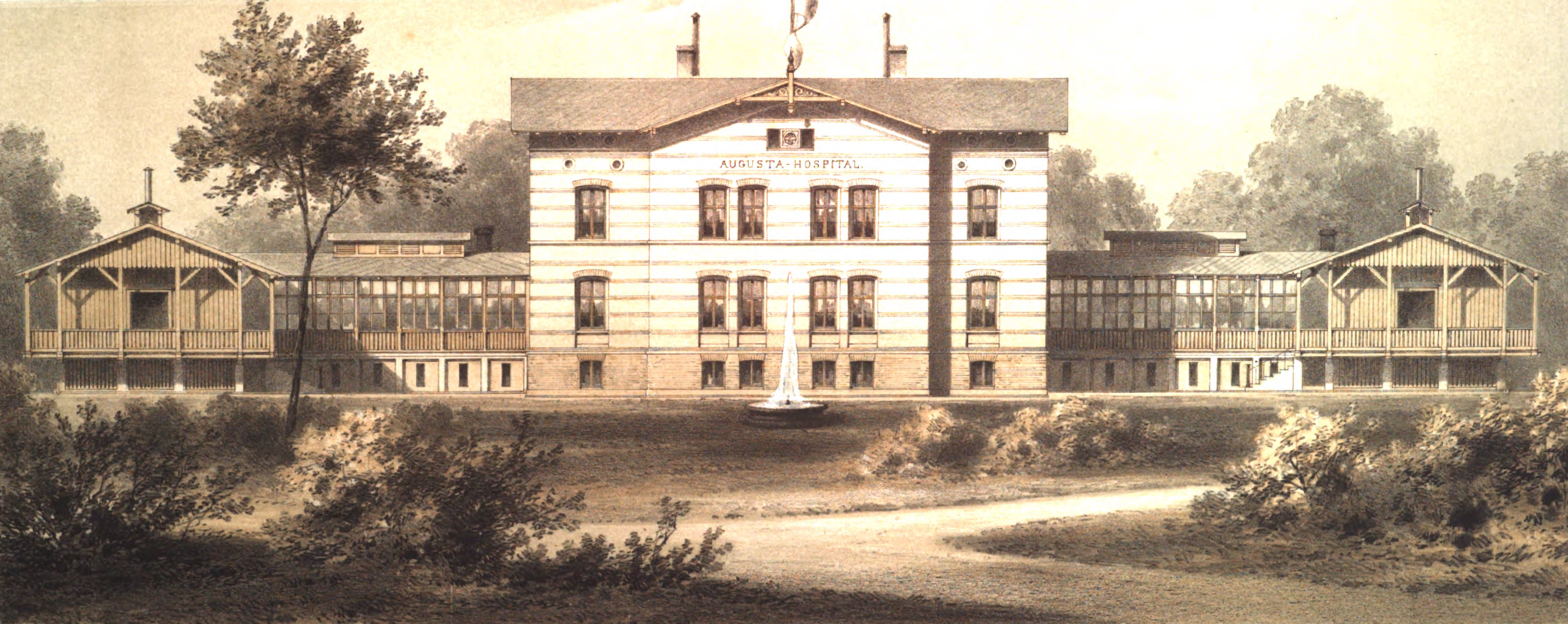 Das Augusta-Hospital in Berlin